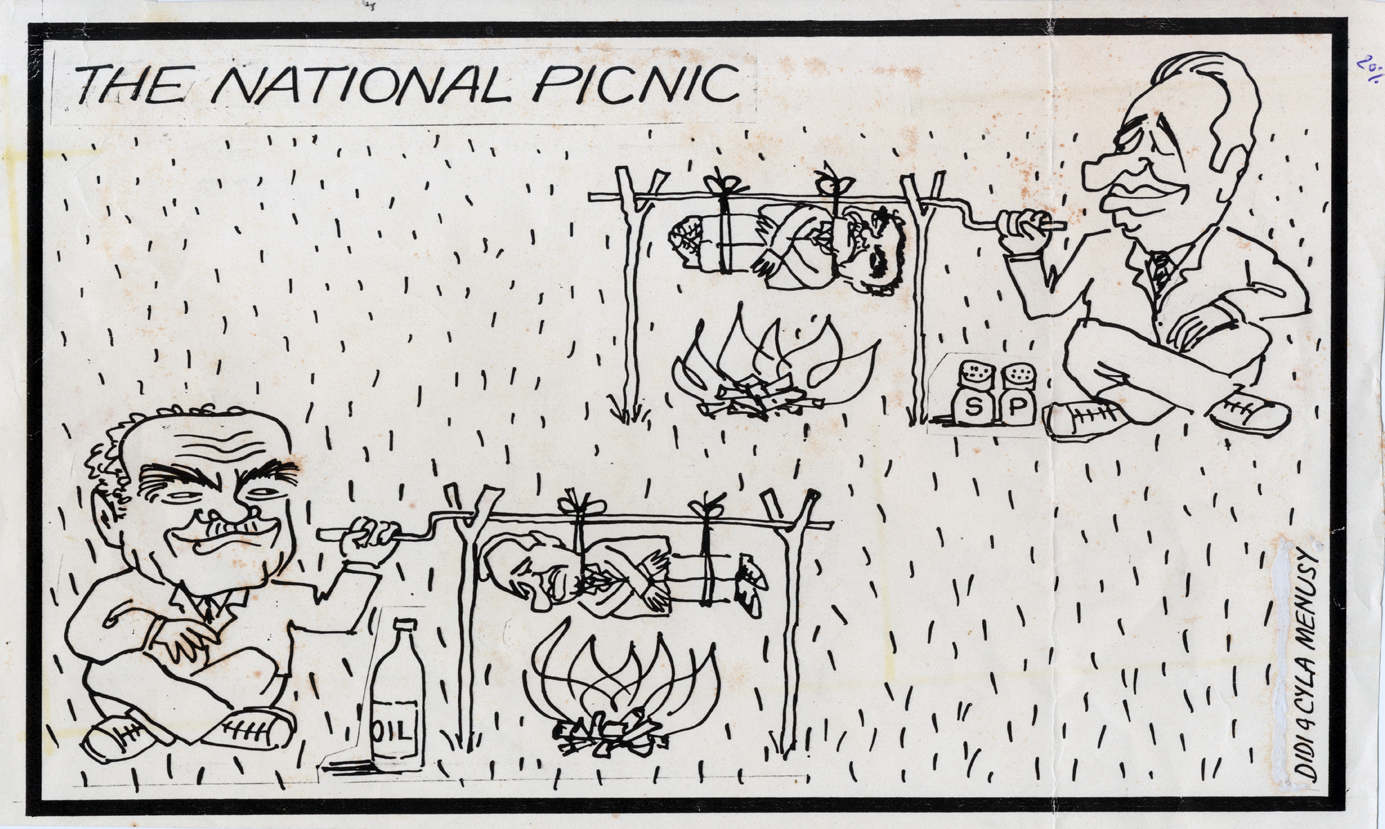 Cartoon